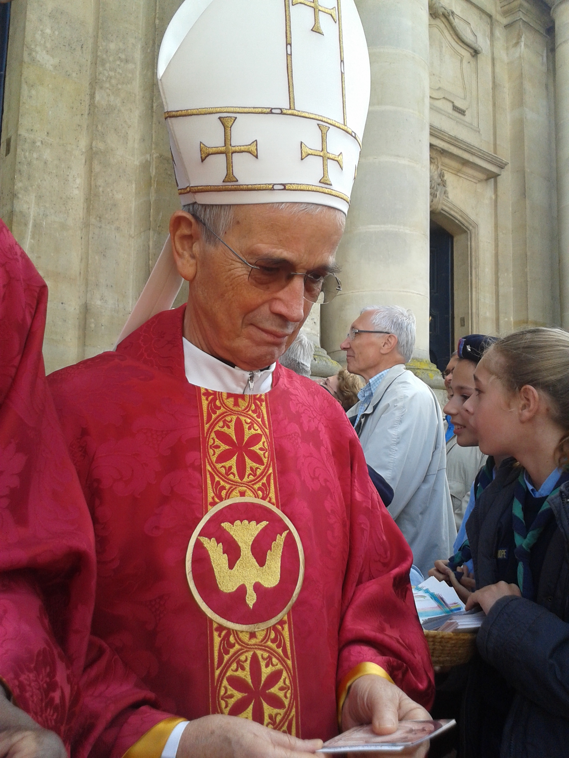 Mgr de Berranger sortant de la cathédrale de Versailles après les ordinations presbytérales du 29 juin 2014